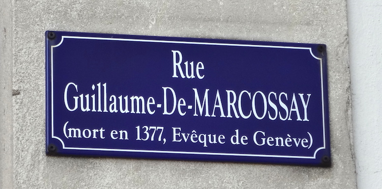 Rue Guillaume-De-Marcossay à Genève. Ruelle entre la rue Vignier l'avenue Henri-Dunant dans le quartier de Plainpalais à Genève.